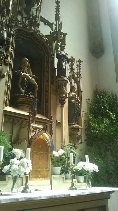 Boční oltář